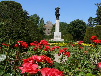 Kalemegdan, Belgrade